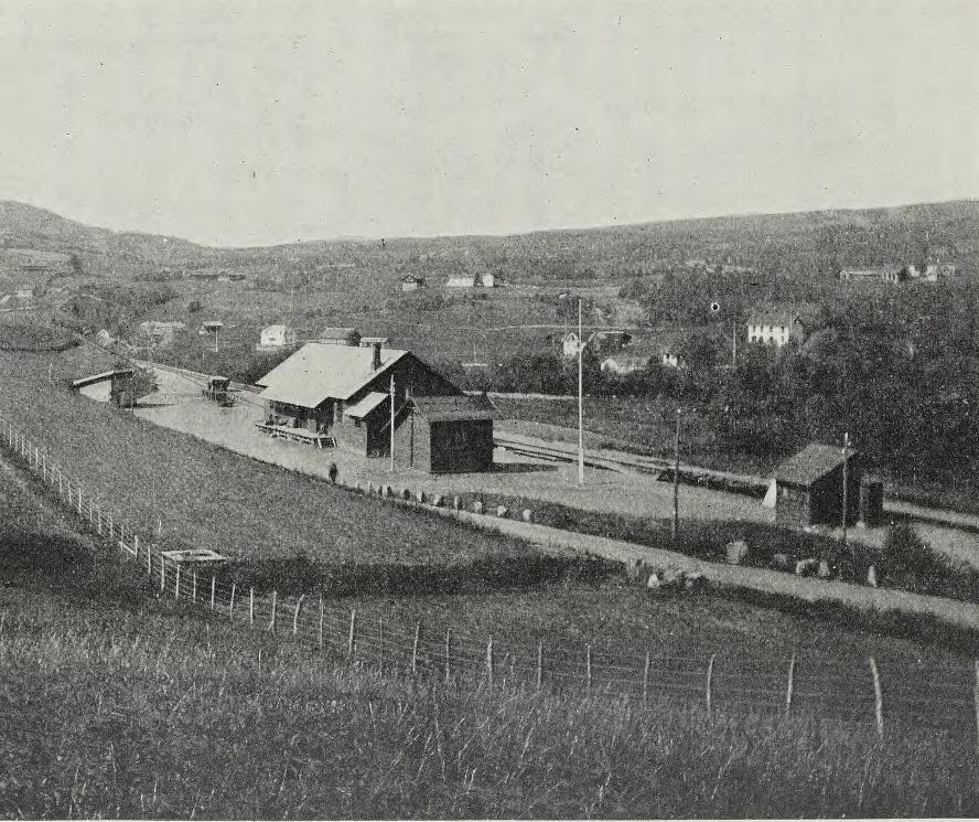 Godshuset mm. på Brandbu stasjon fotografert av Knut Olai Bjørlykke